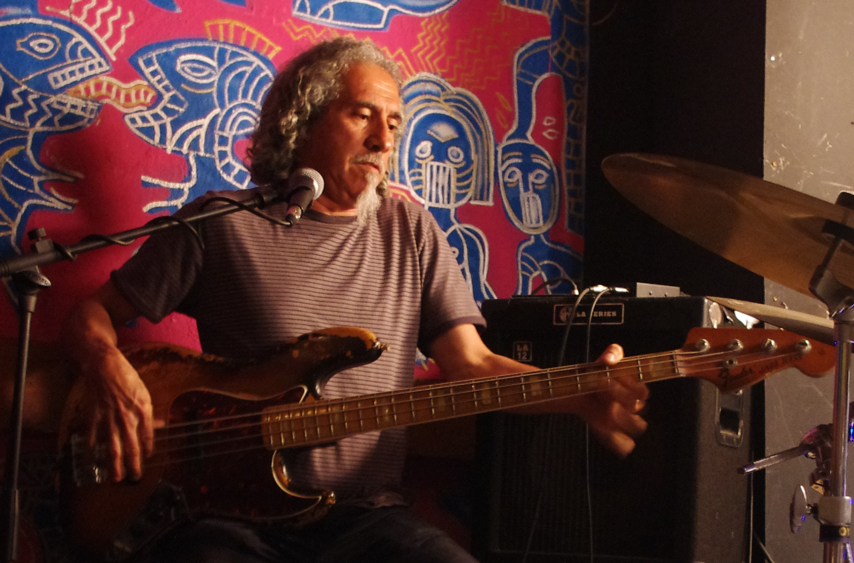 El músico uruguayo Urbano Moraes en un espectáculo presentado en el pub Kalima (Montevideo).